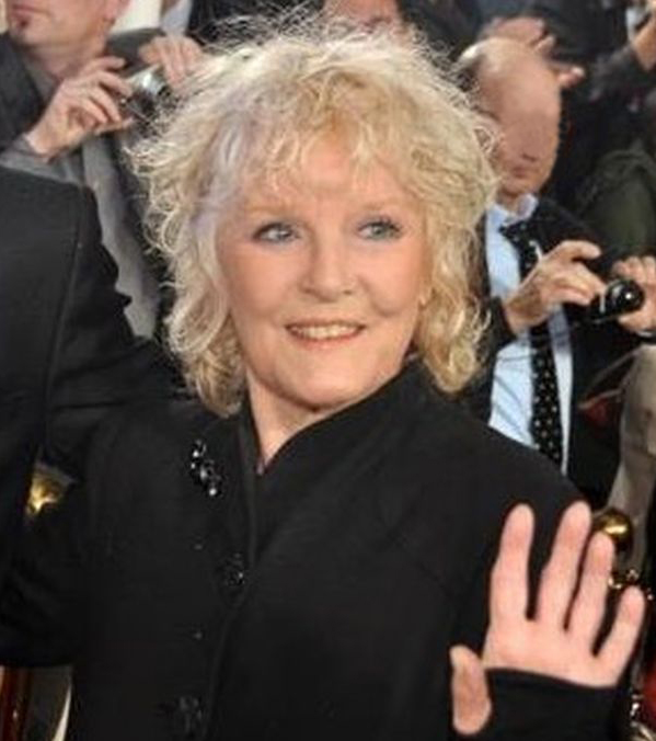 Mani Hoffman et Petula Clark à l'enregistrement de Champs-Elysées.